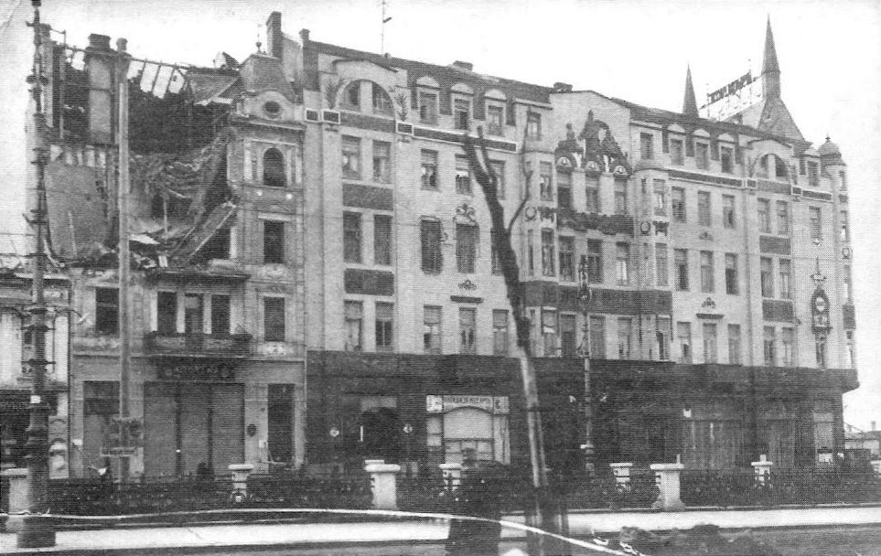 Српски (ћирилица): Бомбардована зграда у Београду 1914. / Bombarded building in Belgrade in 1914.